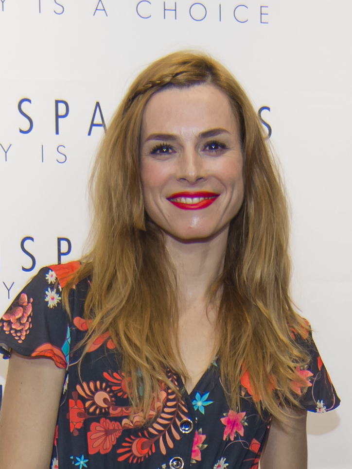 HispanitasLovesMadrid